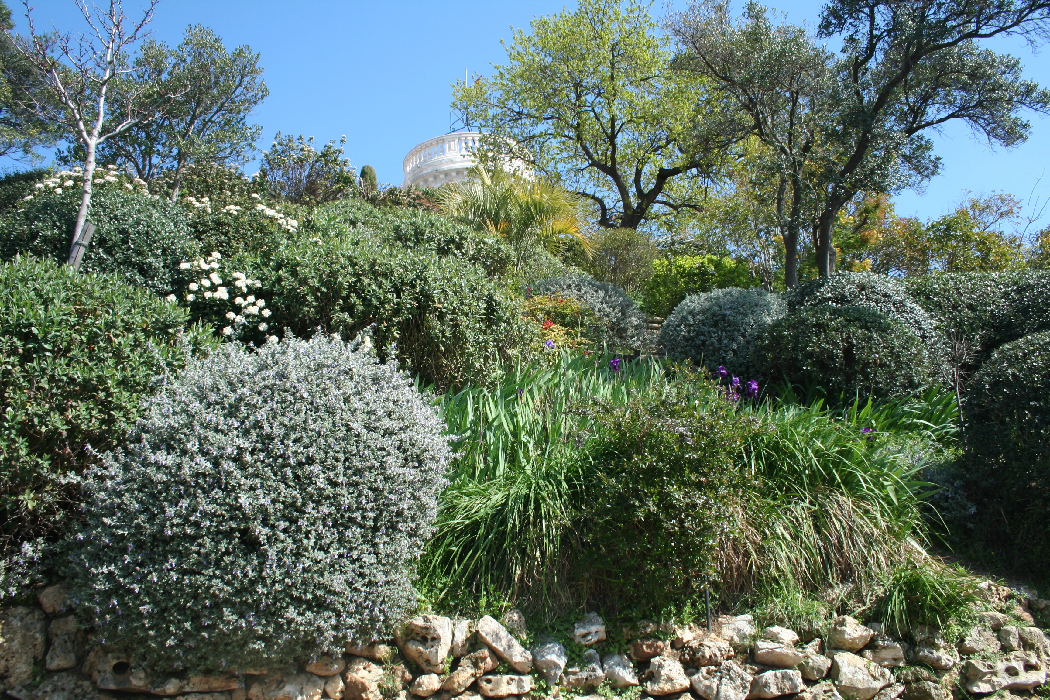 Mauguio (Hérault) - ancienne motte féodale.